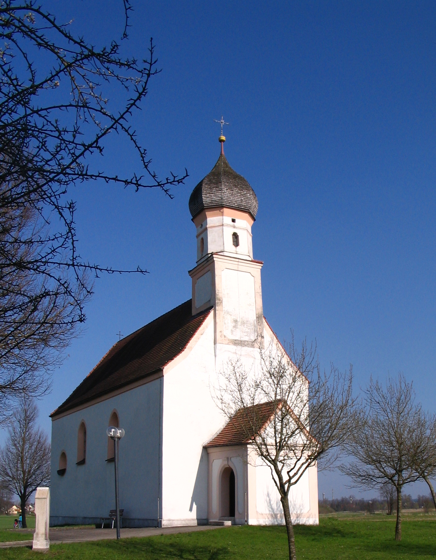 Niederwöhr (Münchsmünster): Dorfkirche St. Martin